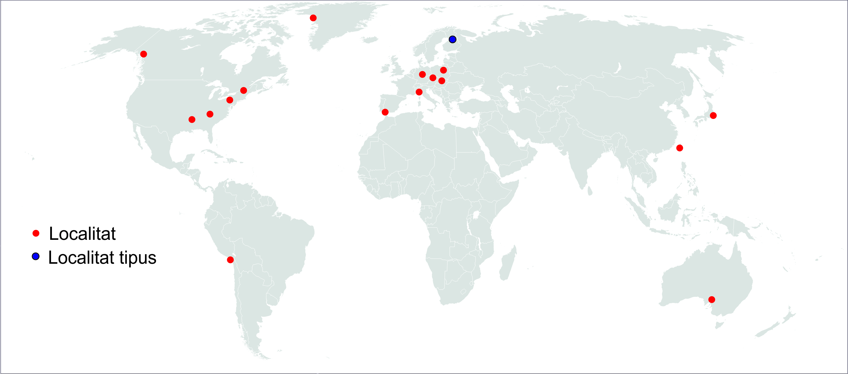 Mapa de descripció de la schwertmannita